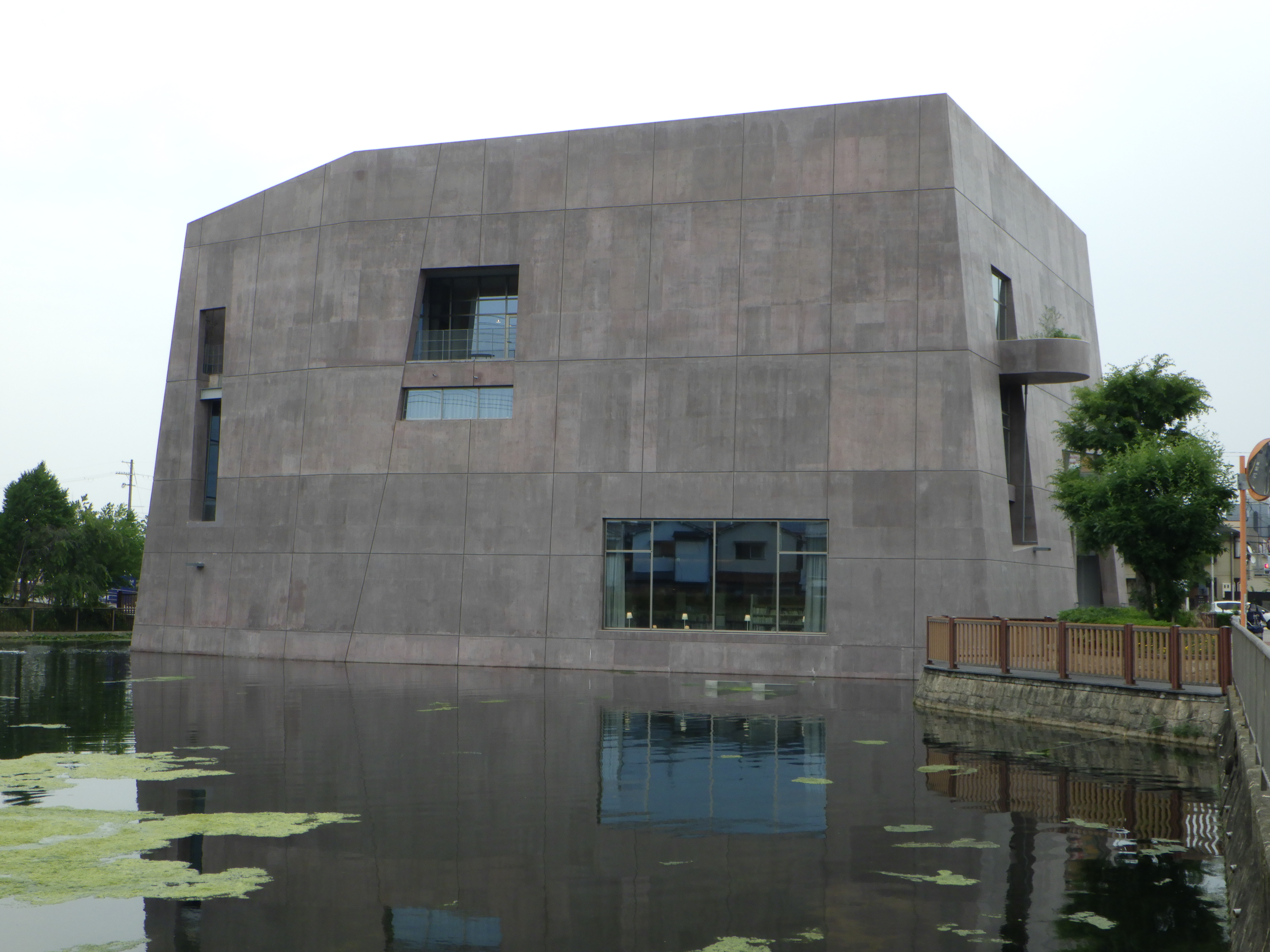 大阪府松原市にある松原市民図書館の読書の森（松原図書館）